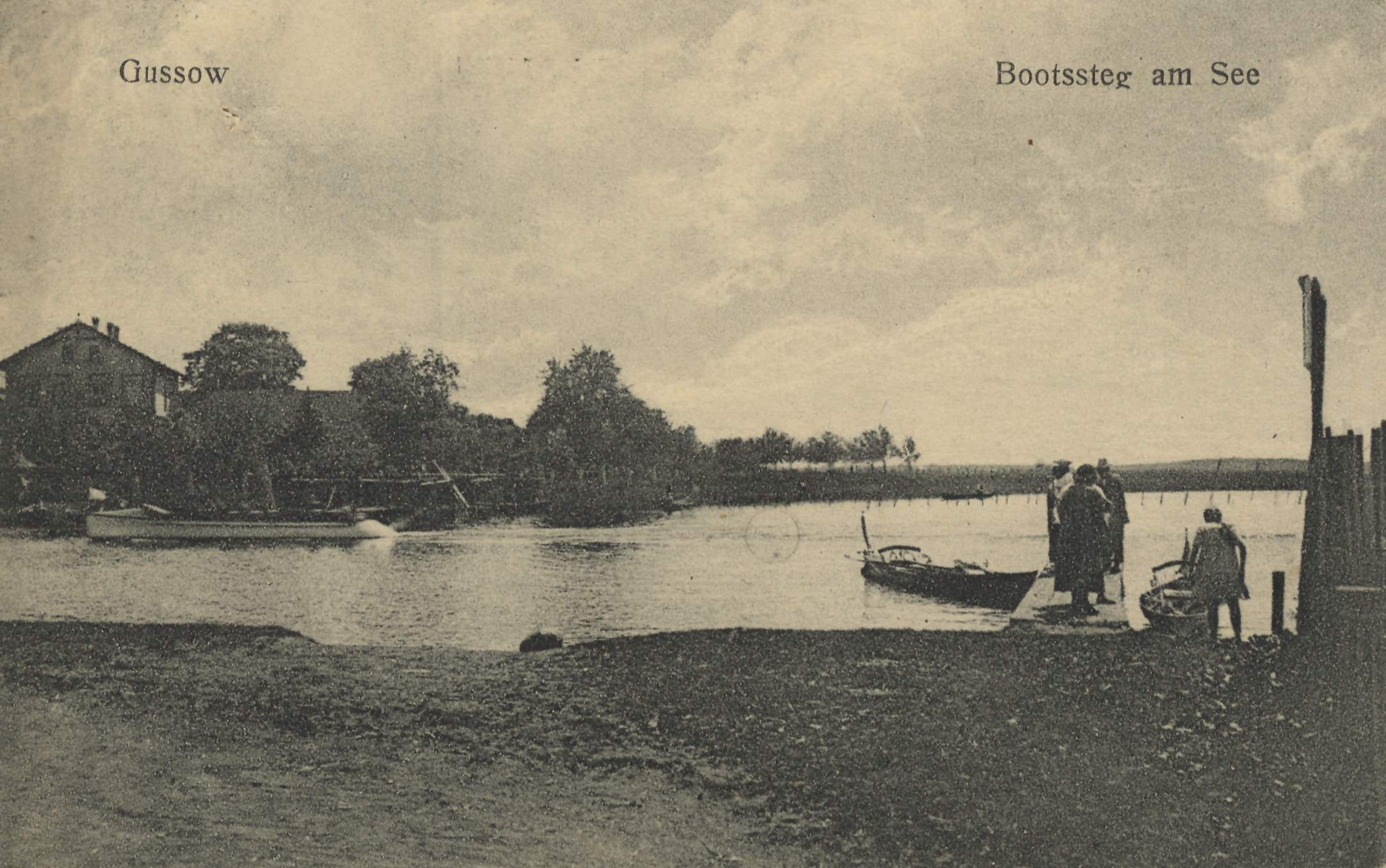 Bootssteg am See